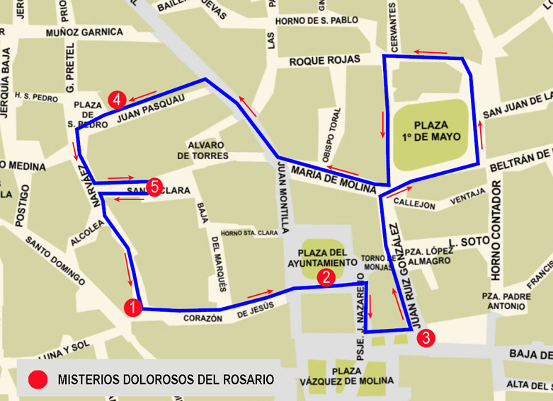 Itinerario procesional